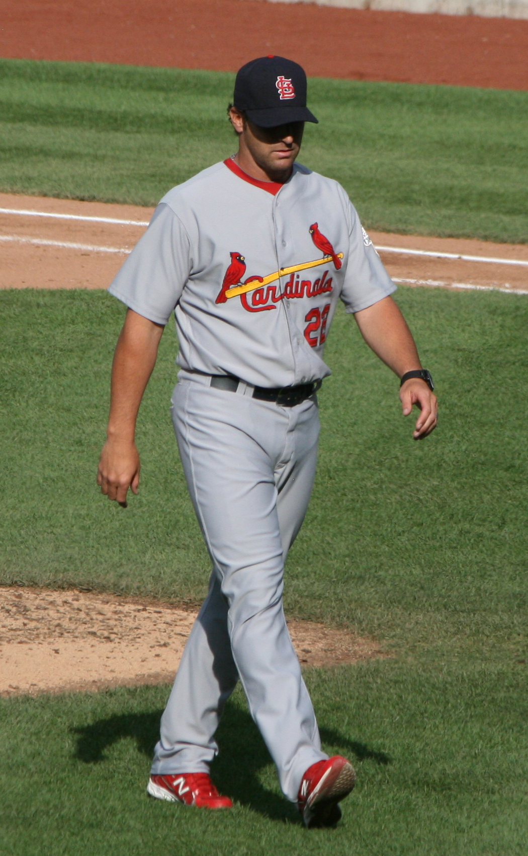 Mike Matheny